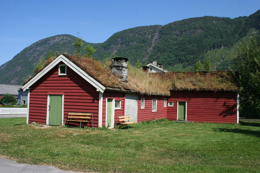 Die Borgstova in Vik